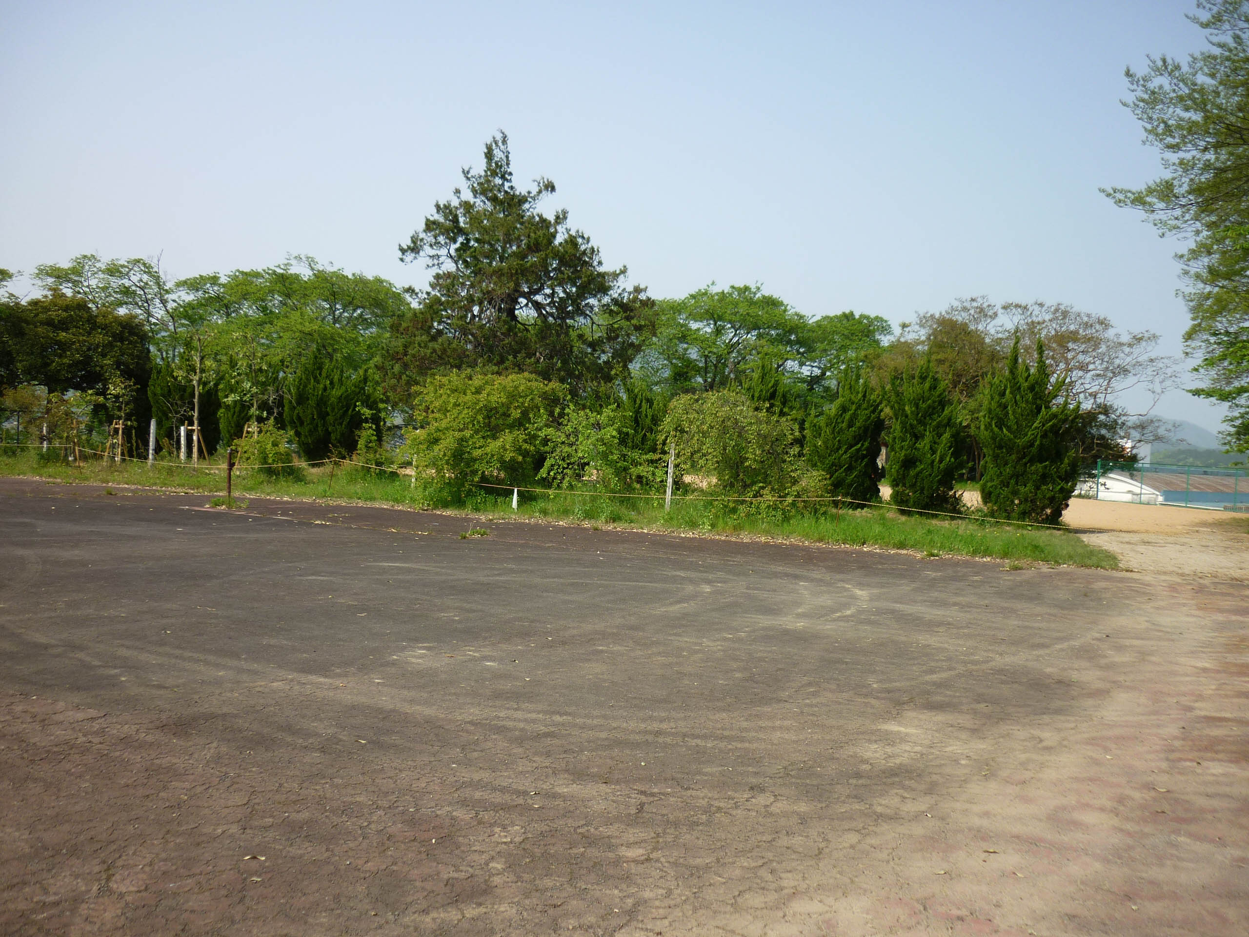 曲輪跡